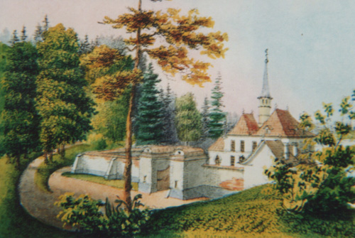 Приоратский дворец в Гатчине